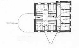 Detalle.